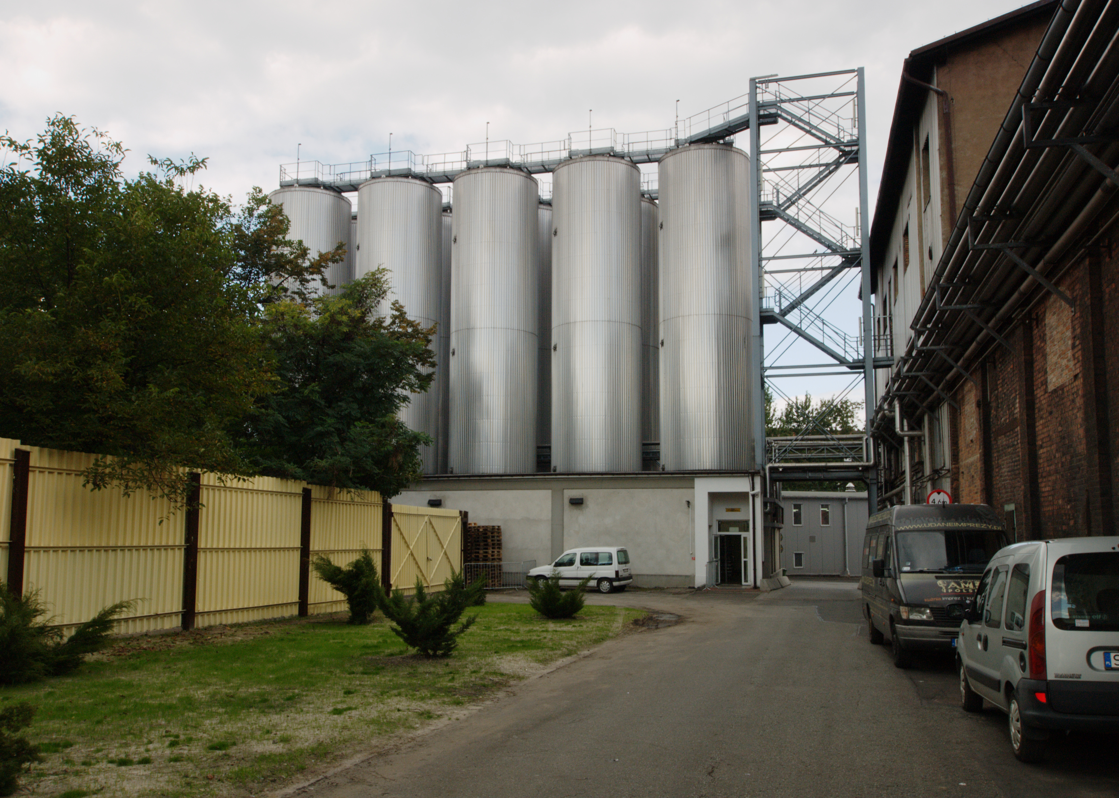 Browary Górnośląskie w Zabrzu. Tankofermentory.